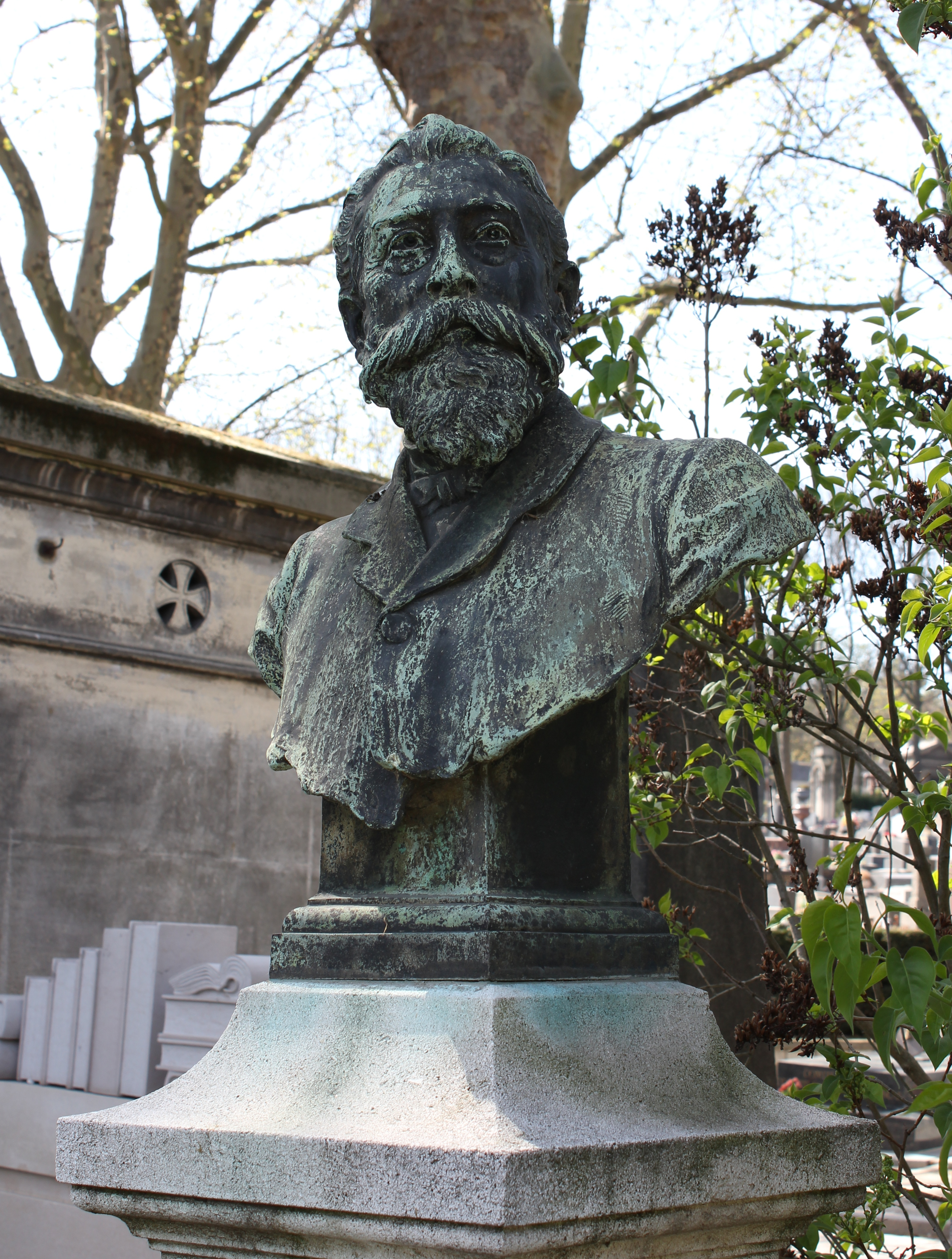 Sépulture du socialiste Paul Brousse (1844-1912). Stèle ornée d'un buste en bronze.Buste